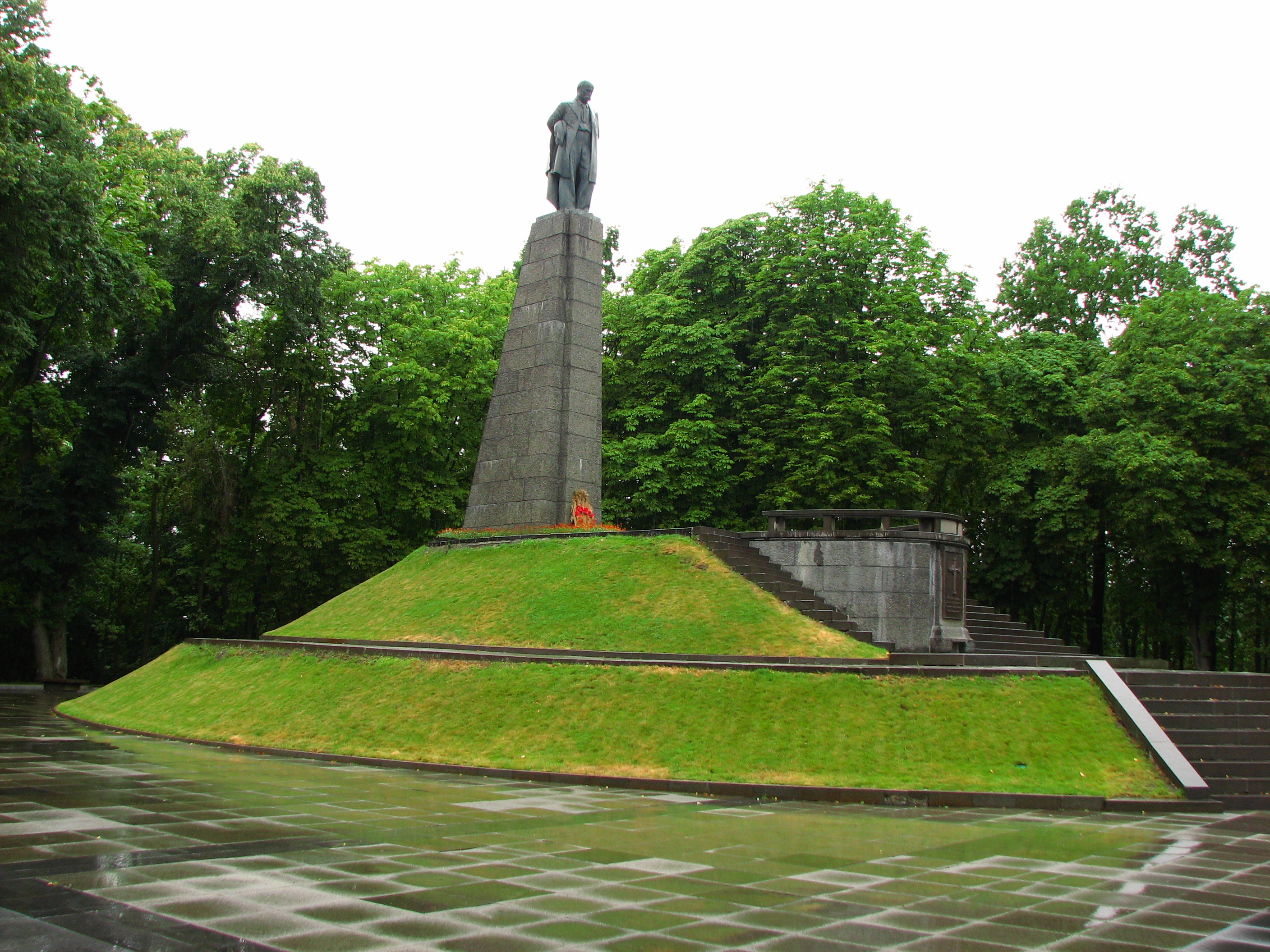 Т.Г. Шевченко.